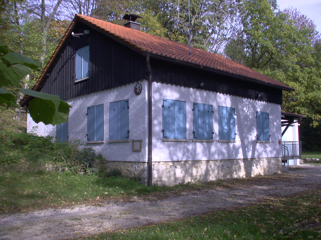 Hütte der Bergwacht auf der Schwäbischen Alb